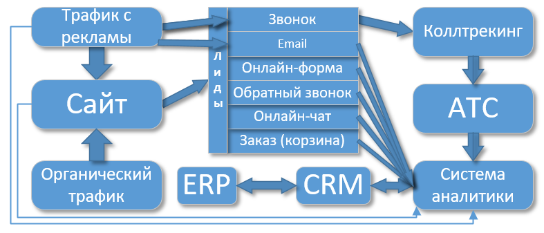 Схема взаимодействия системы сквозной аналитики с другими компонентами